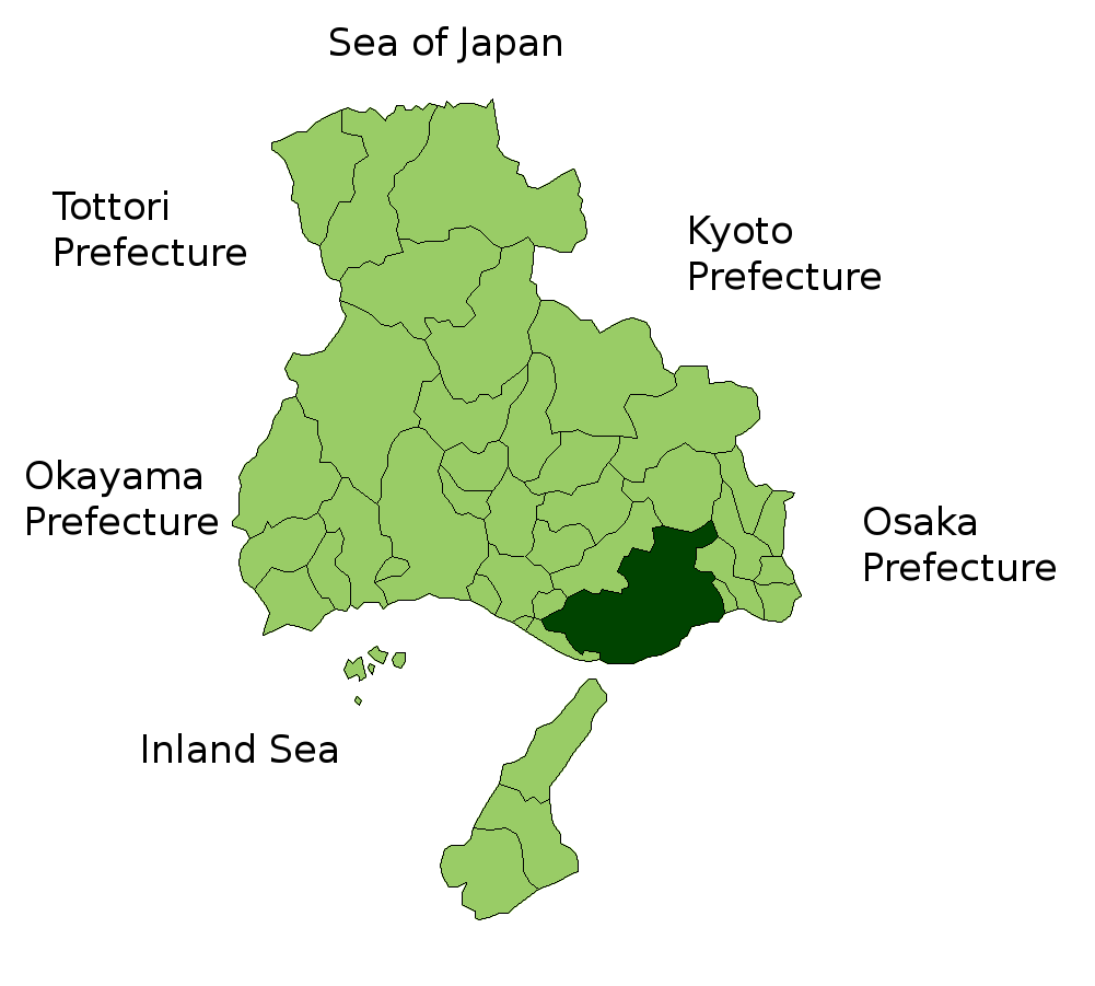 Kobe, Hyogo